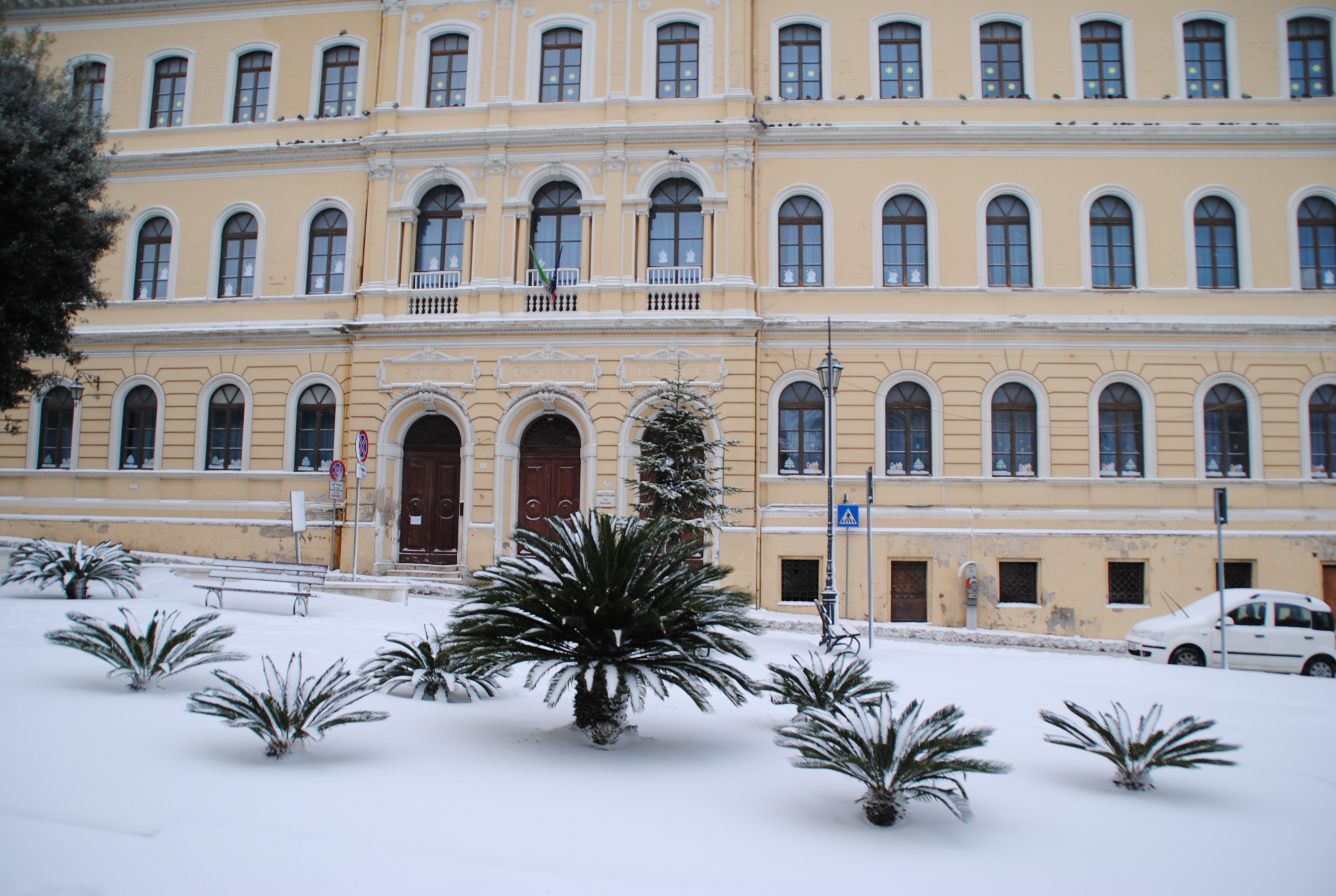 sala civica di scultura "Raffaello Pagliaccetti"